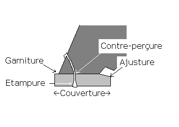 coupe schématique d'un pied de cheval ferré. importé par l'auteur du schéma